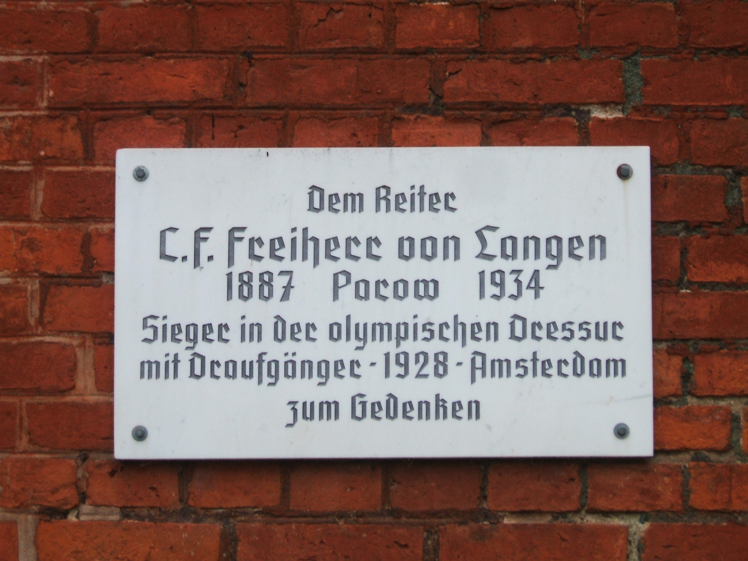 Parow, Gutshaus, Gedenktafel